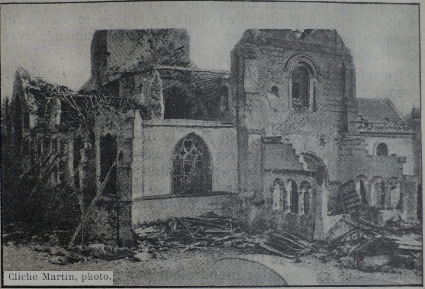 vue de l, église détruite pendant la 1 ere guerre mondiale.